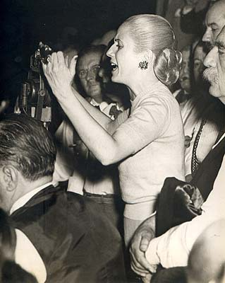 Evita